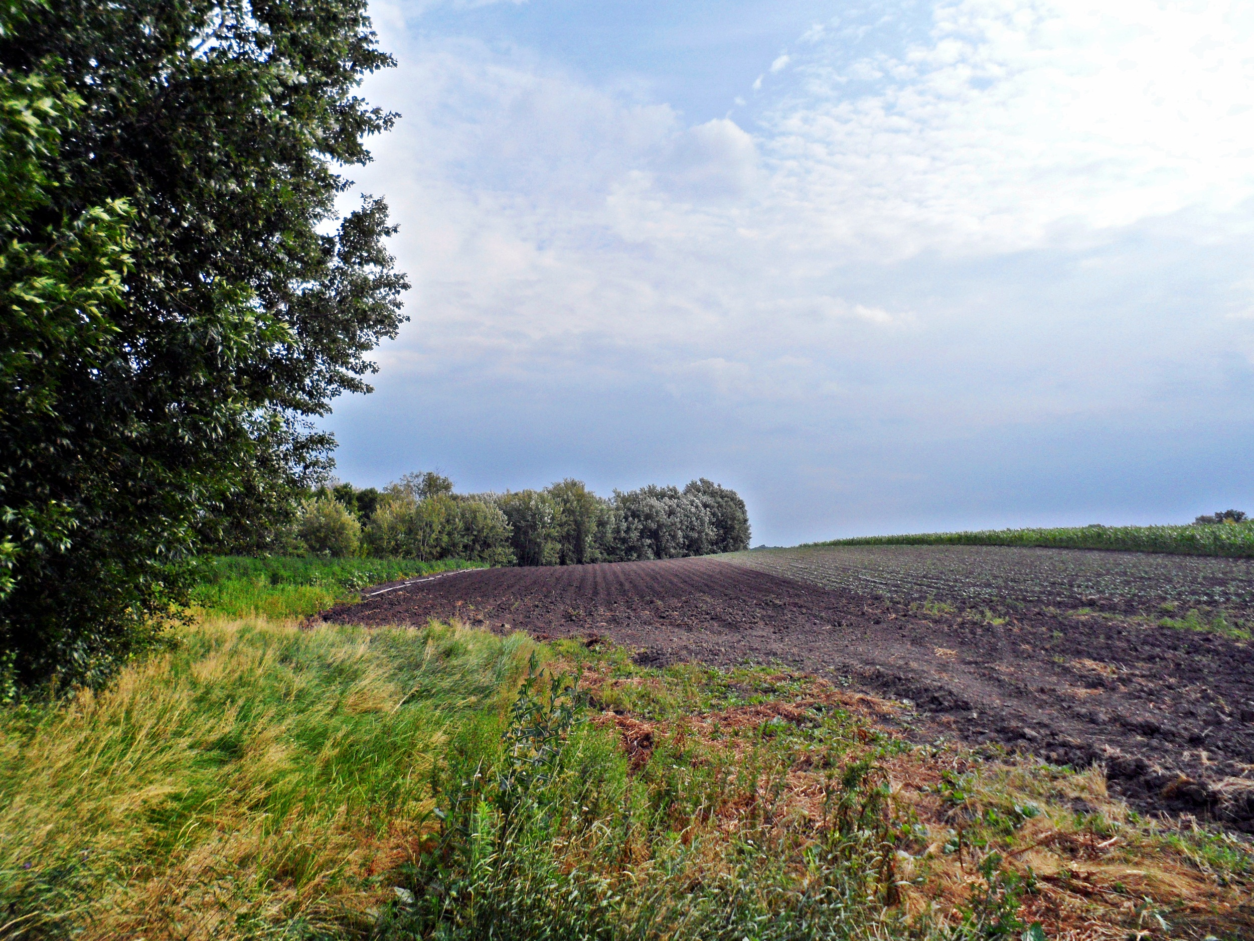 Vojvodina, Park prirode Kamaraš, Horgoš